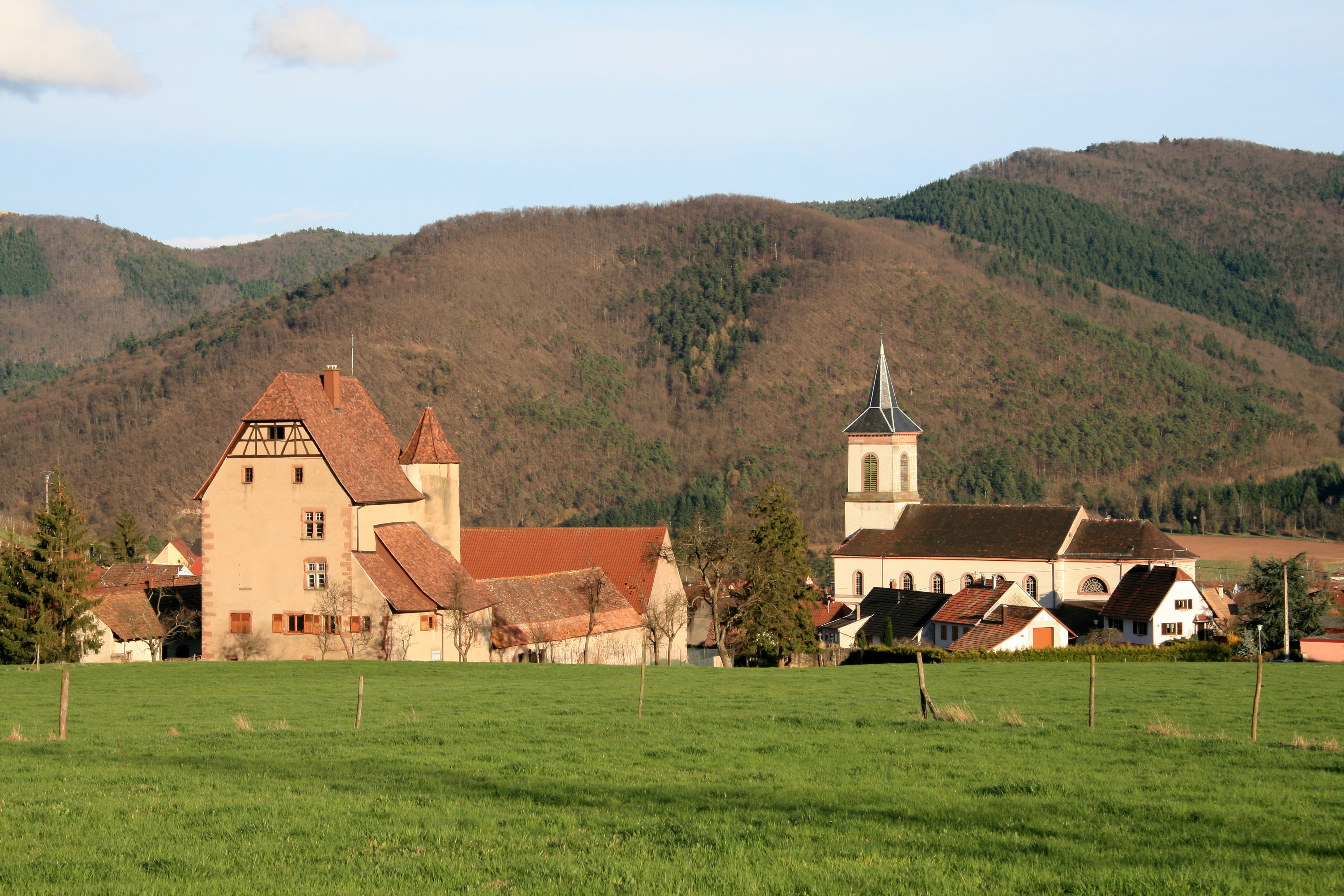 Château et église de Walbach